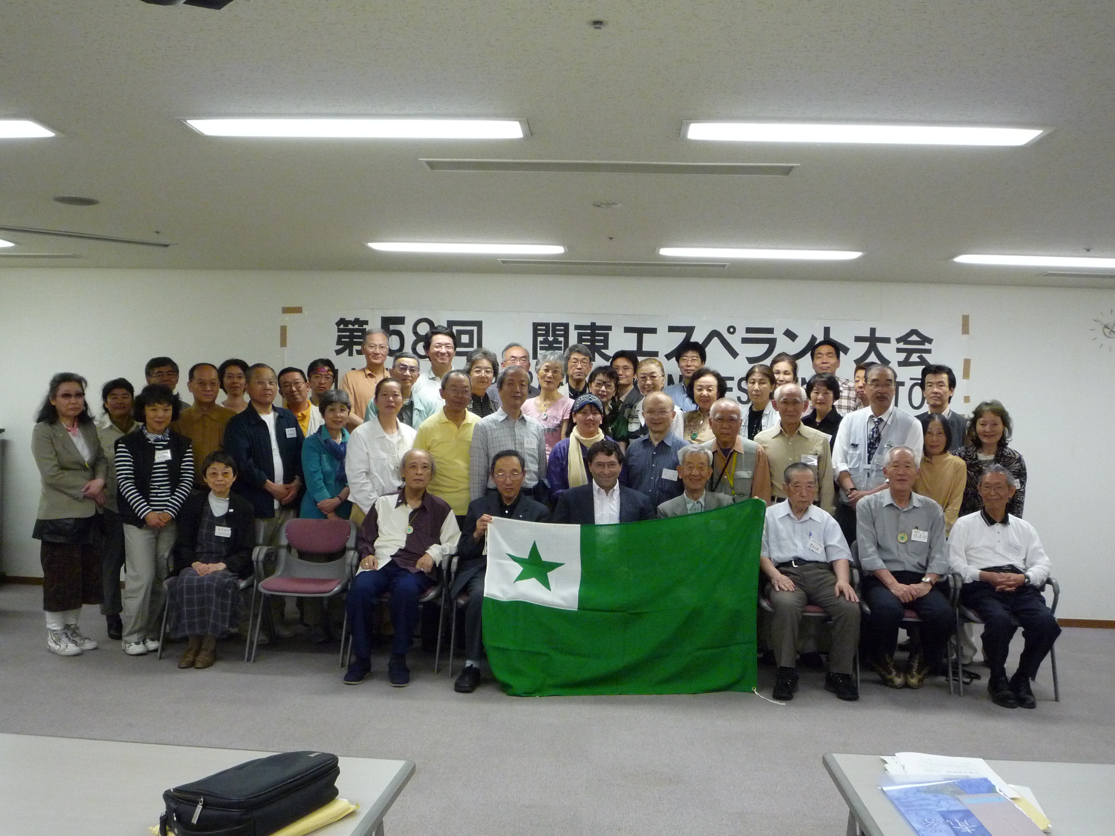 58-a Esperanto-Kongreso en Kanto, Nipono (Japanujo) en 2009. Partoprenantoj komunfotis en kongresa ĉambro.